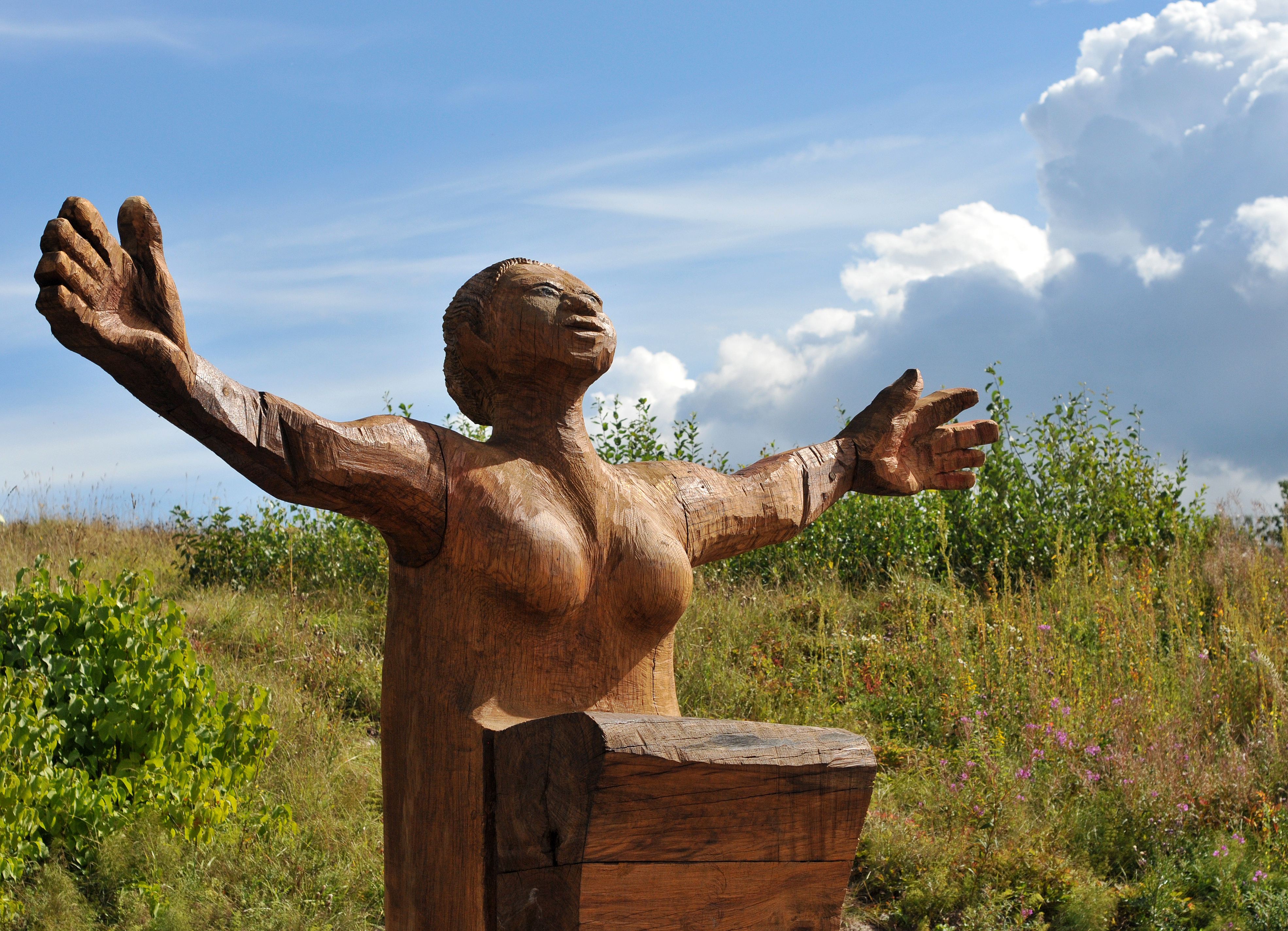 Moder Jord är en skulptur utförd av bildhuggaren Bengt-Erik Nilsson efter en idé av konstnären Anita Grede. Skulpturen är placerad vid Sörmlandsleden på Skavstakullen vid Skavsta flygplats utanför Nyköping.